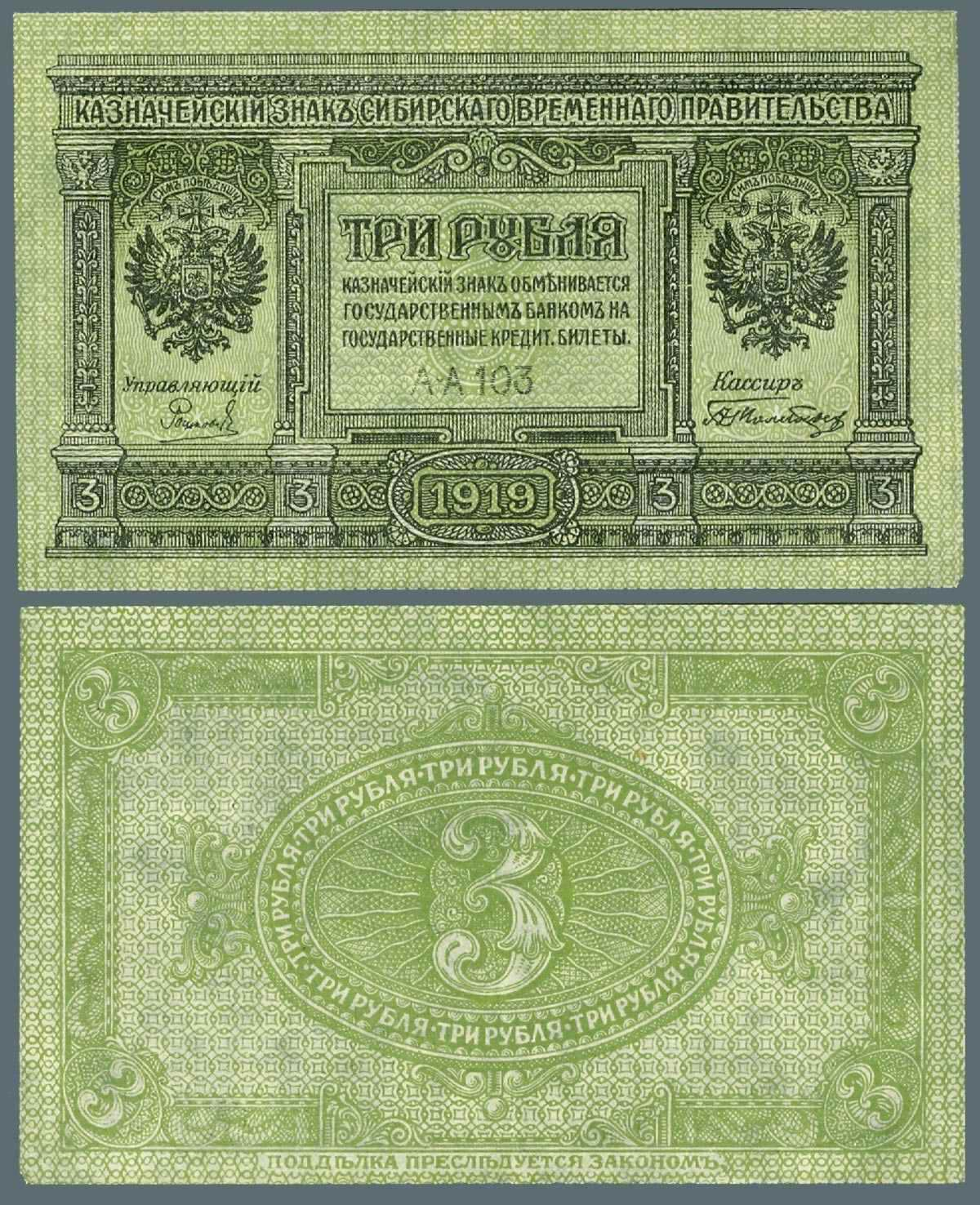 РОССИЙСКОЕ ПРАВИТЕЛЬСТВО (ОМСК). КАЗНАЧЕЙСКИЙ ЗНАК. 3 РУБ. РЯБЧ.2 № 8510 # А А-103